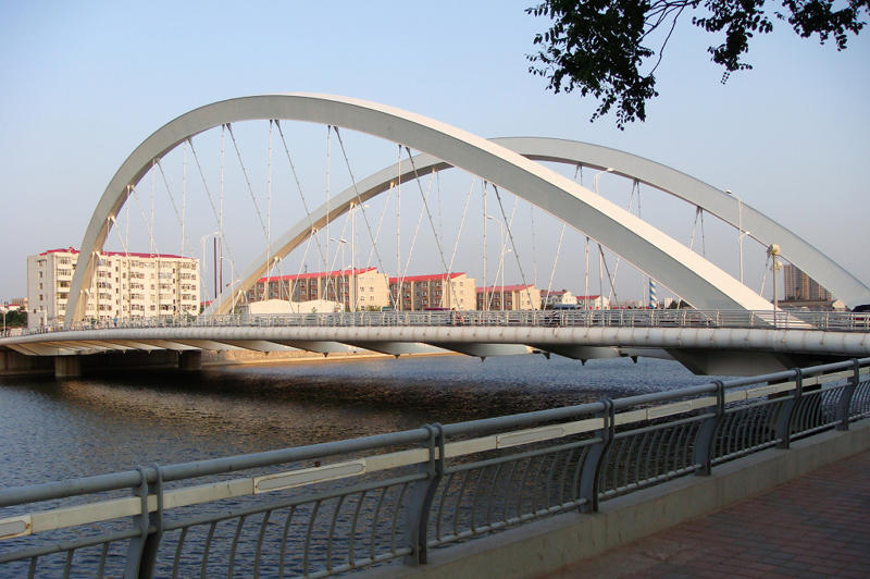 张家口市清水河上的双虹桥，拍摄于2010年6月10日。